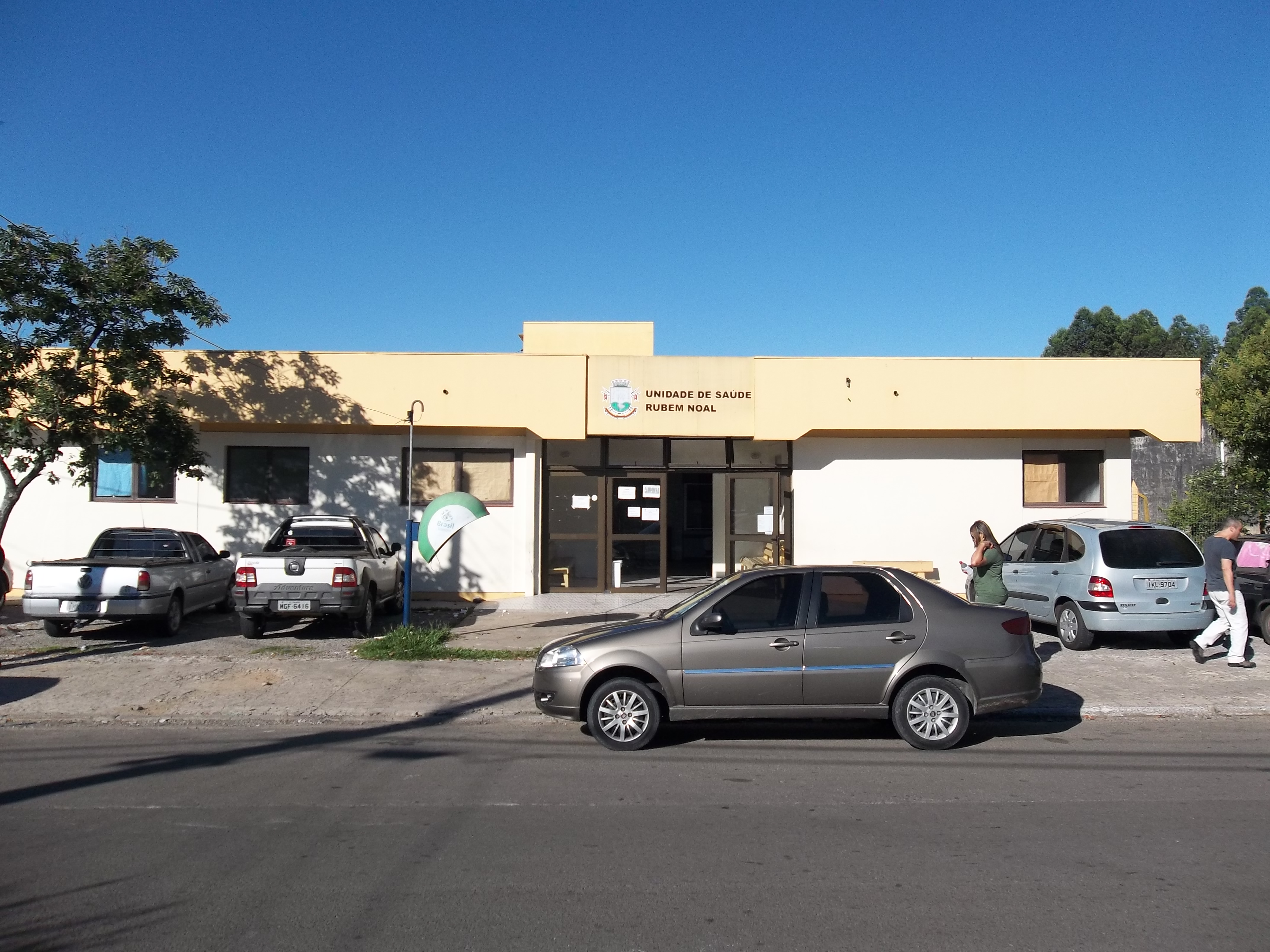 Unidade de Saúde Rubem Noal. Tancredo Neves, Sede, Santa Maria, Rio Grande do Sul, Brasil.